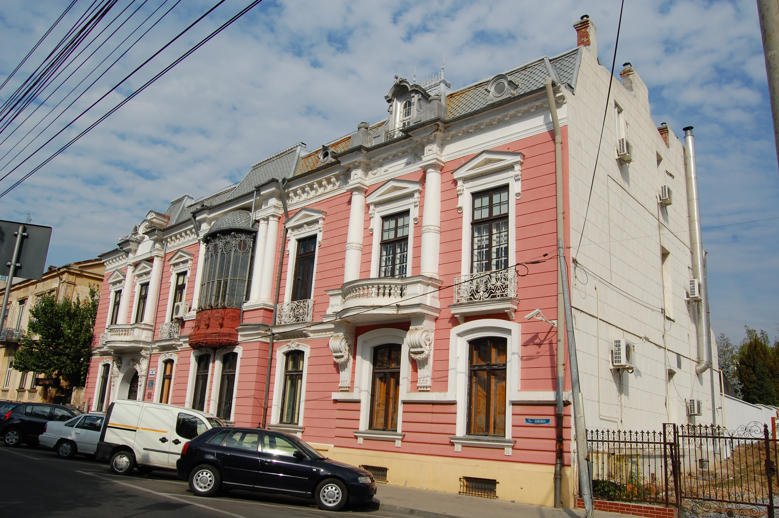 Astăzi Casa Universitarilor, Craiova